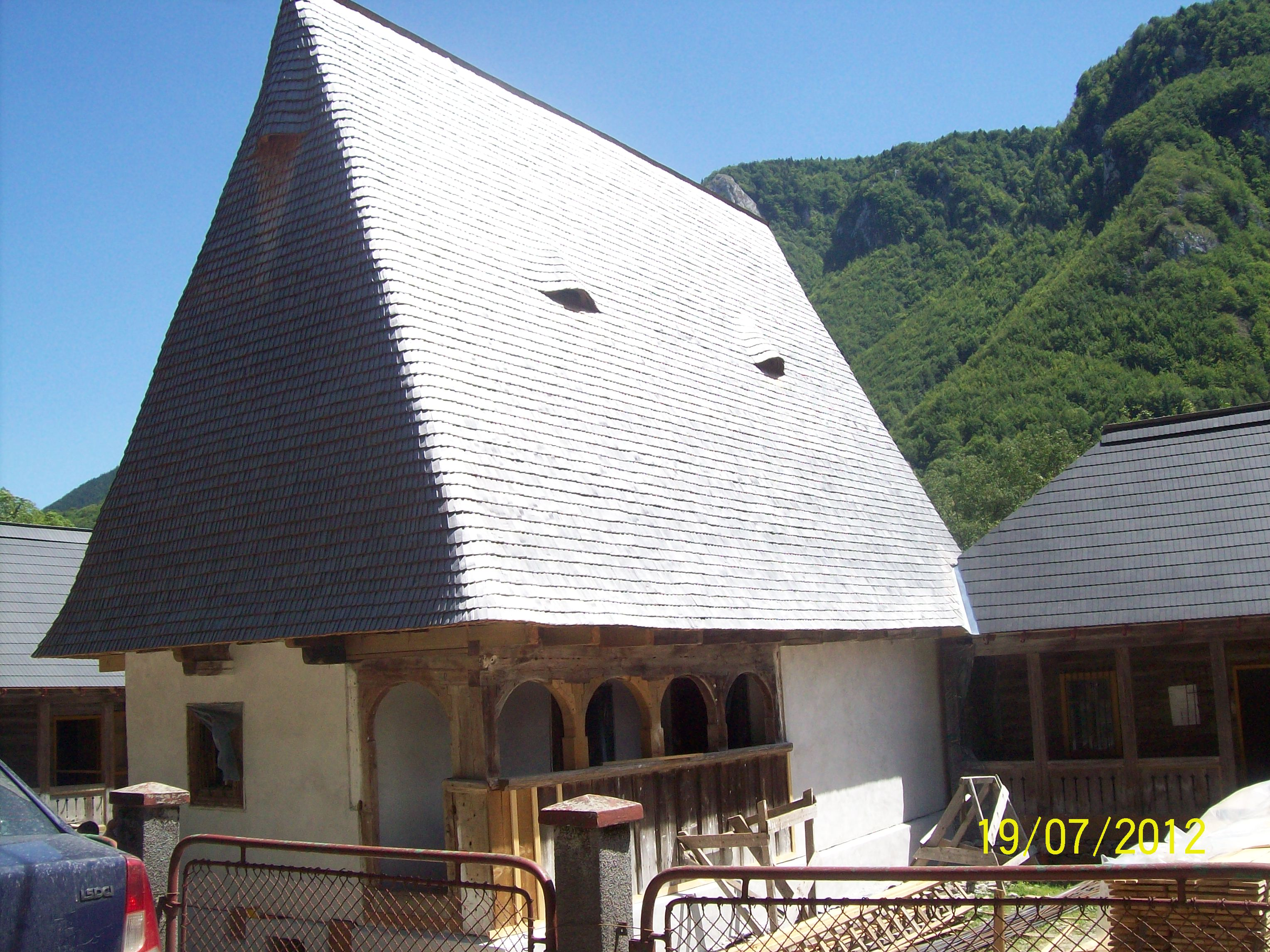 Casa memoriala Avram Iancu se afla in comunca care astazi ii poarta numele.